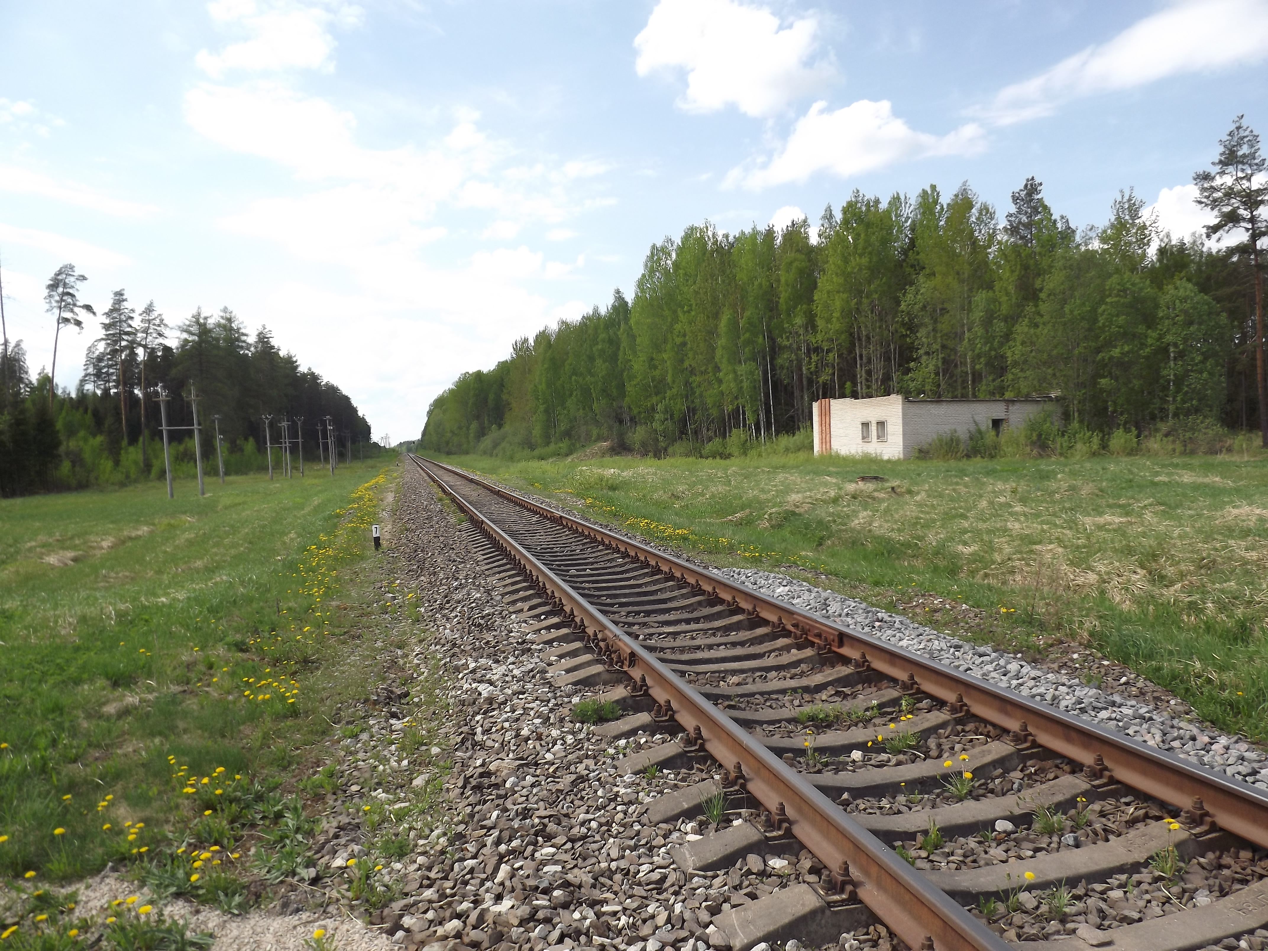 Endine Mürgi raudteepeatus